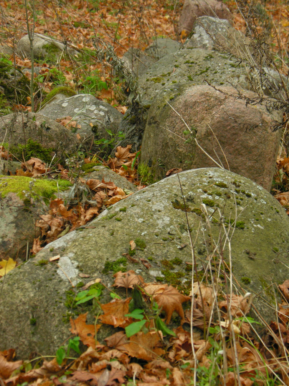 Rieduliai Foto: Algirdas, 2005 m. lapkričio 5 d.